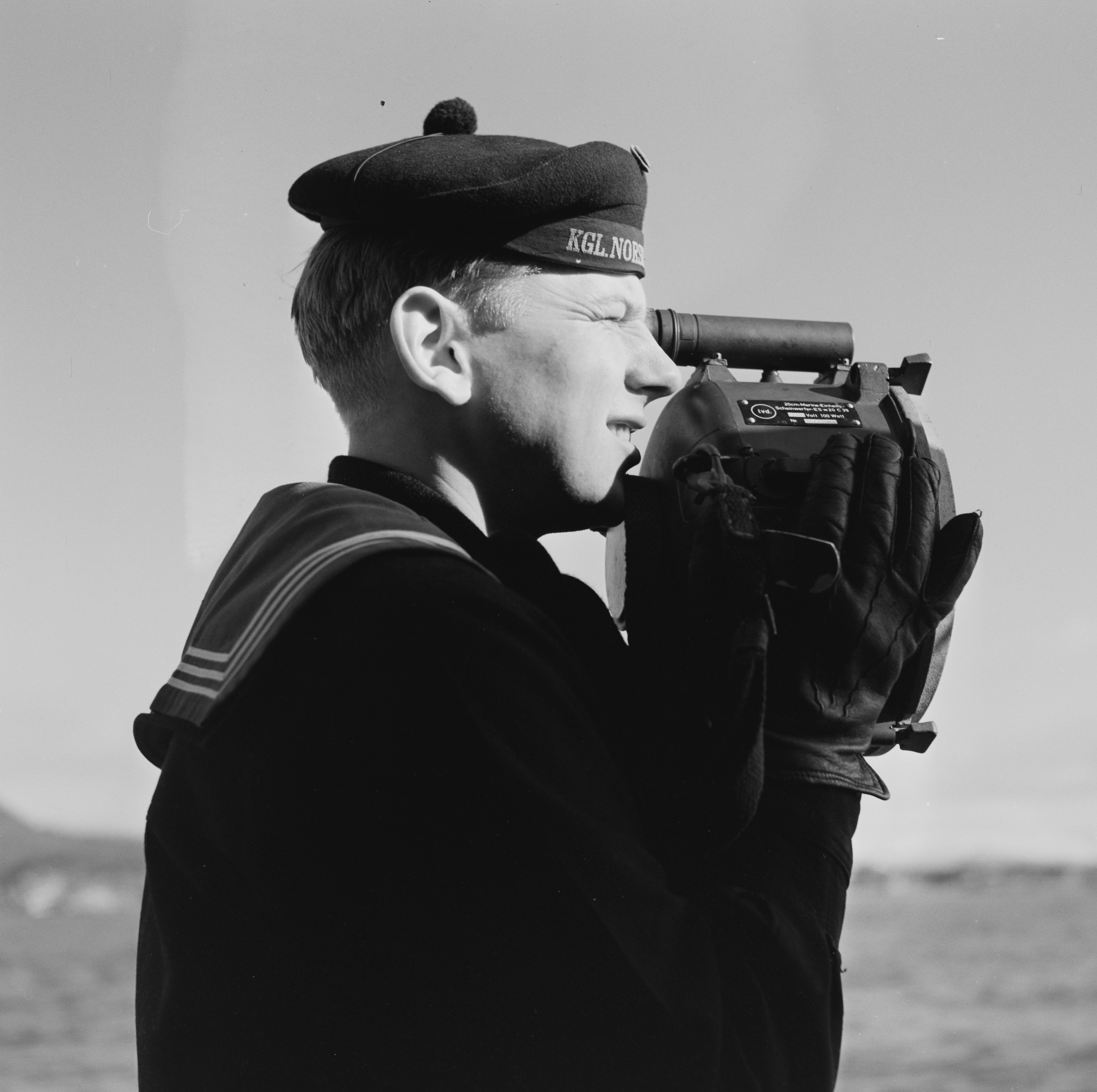 Bildet er hentet fra Arkivverket. Ubåt, K.N.M. Kya. NÅ nr. 17, 1955 Arkivinstitusjon : Riksarkivet Arkivnavn : Billedbladet NÅ Sted : Norge, Ukjent, Ukjent, Ukjent Emneord: Ubåter, Menn, Maritimt Avbildet